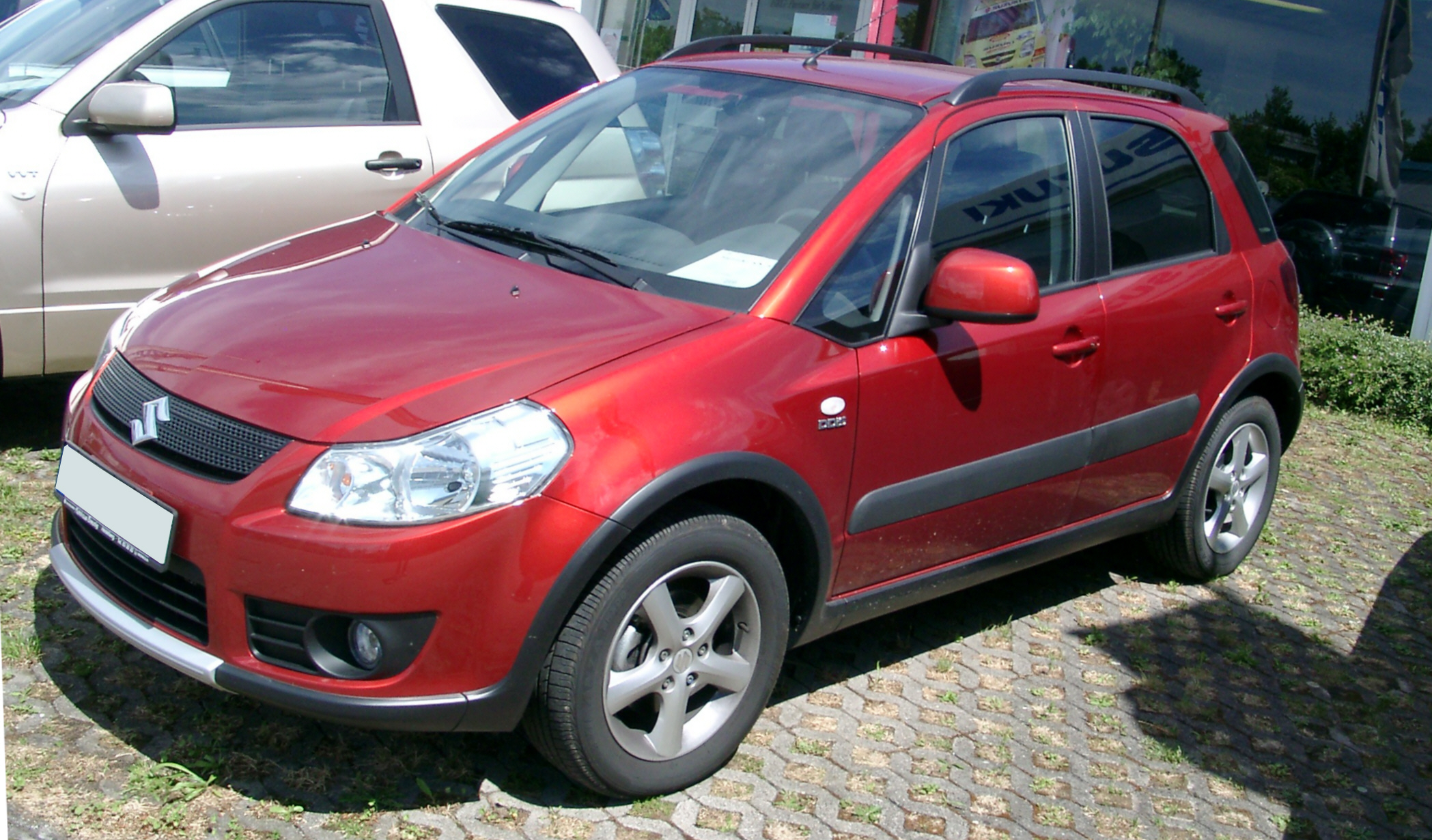 Suzuki SX4